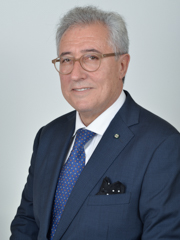 Francesco Giacobbe, politico italiano